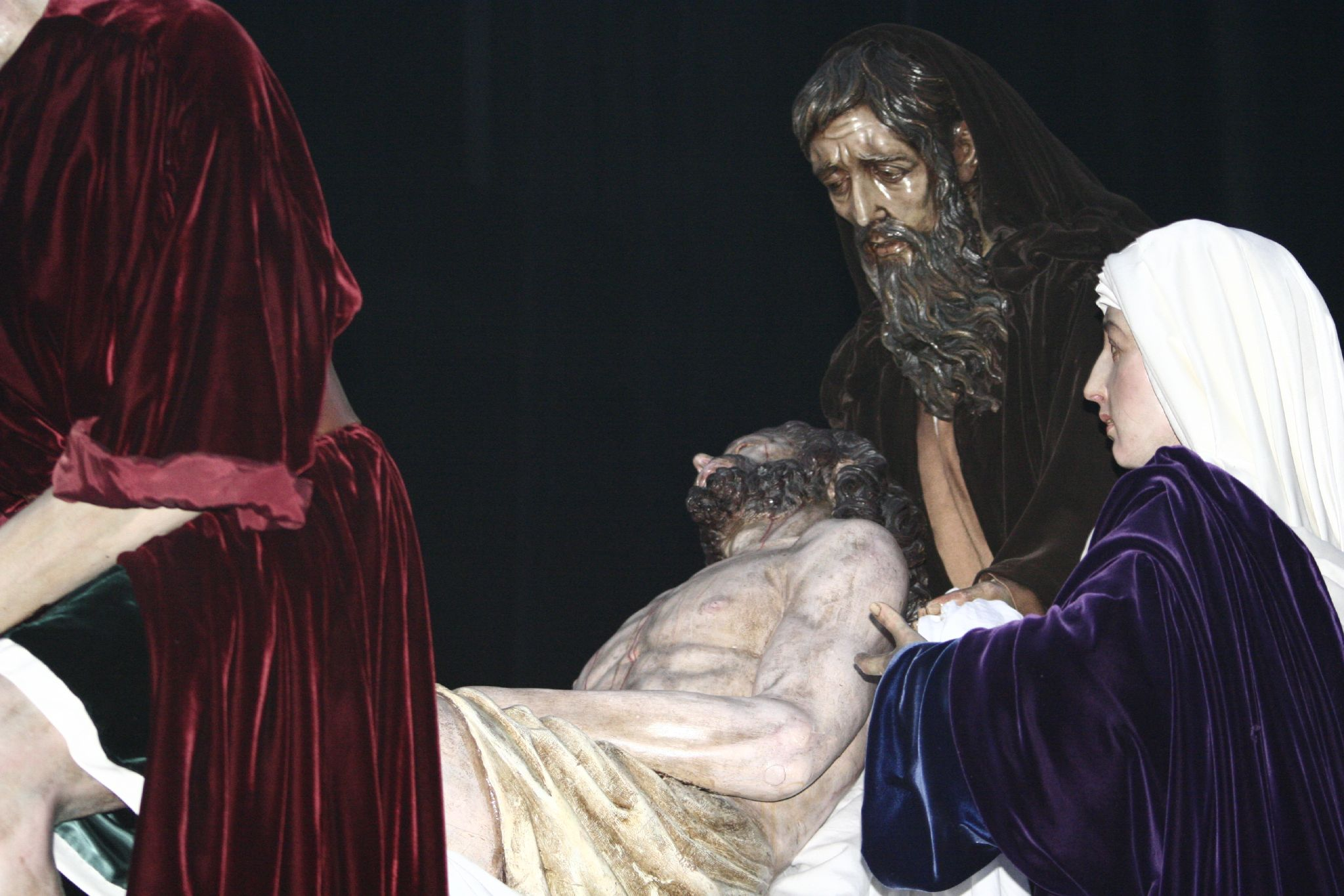 Santa Marta. Semana Santa en Sevilla. Año 2006 Foto realizada y propiedad de Ángel Cachón